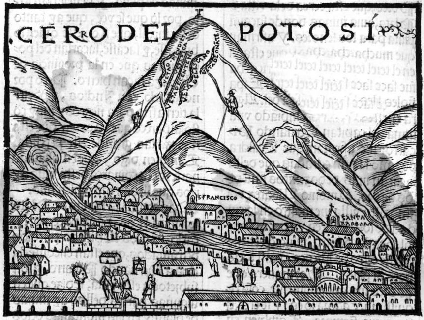 Потоси. Рисунок из Хроники Перу, 1553